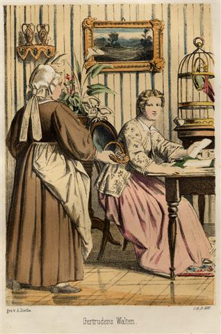 Aus Töchteralbum Band 14 von Thekla von Gumpert